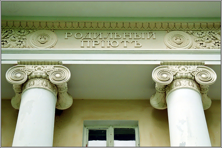 Роддом в городе Вичуге (1912, арх. В. Адамович, И. Жолтовский)